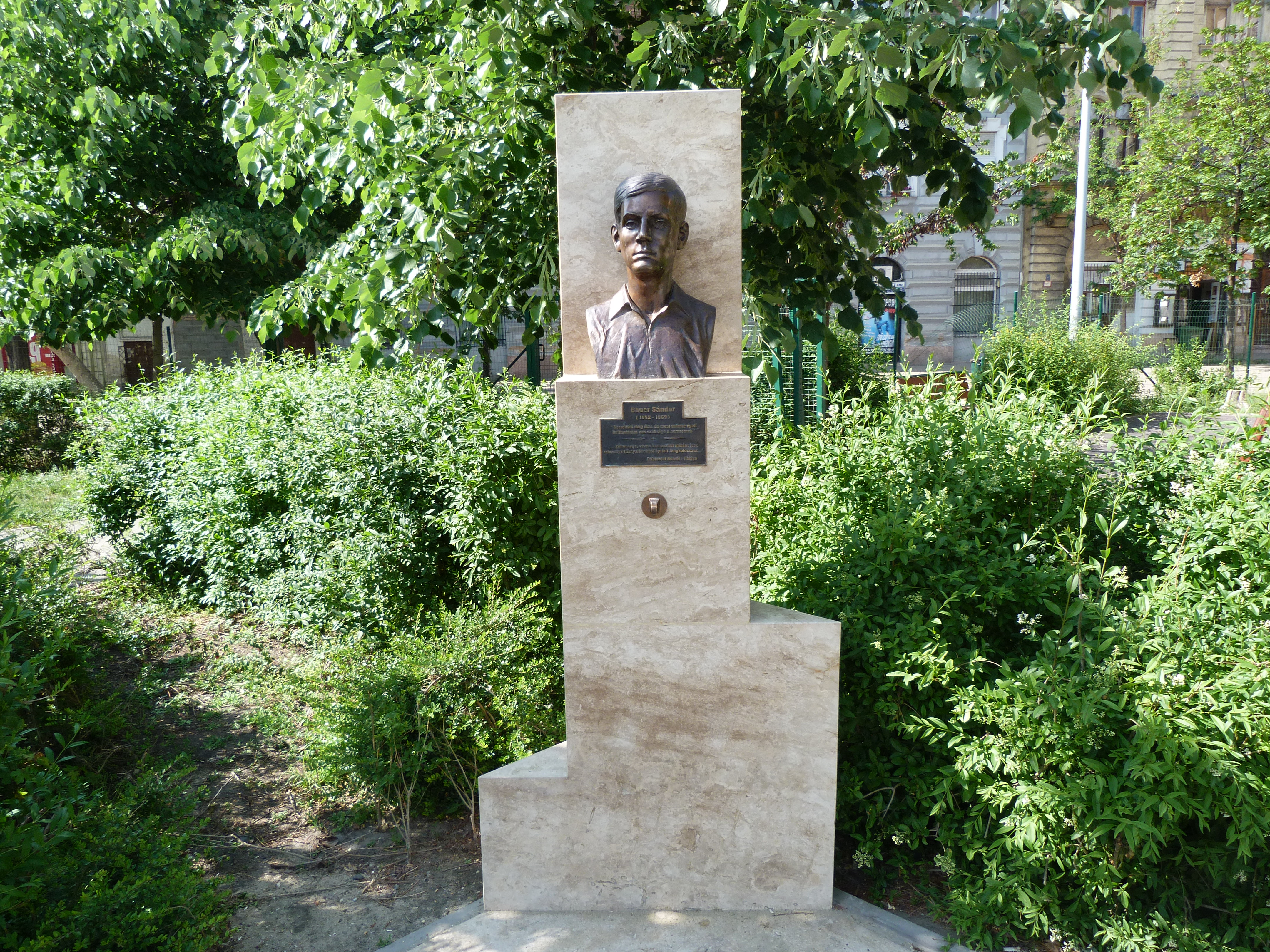 Bauer Sándor (1952 – 1969). - Józsefváros Mátyás tér